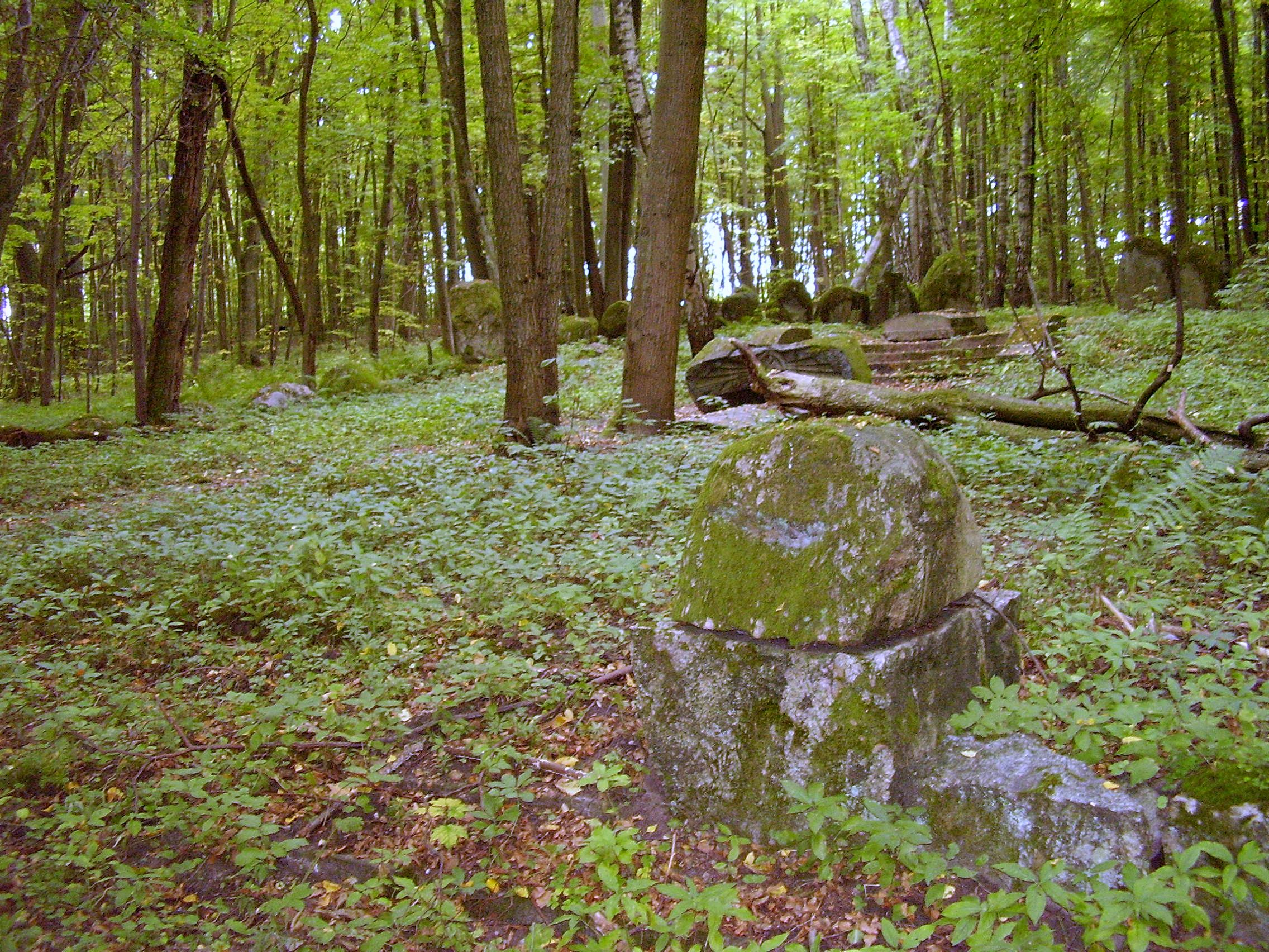 pseudomegalityczny cmantarz rodziny Dohnów (graff zu Dohna)